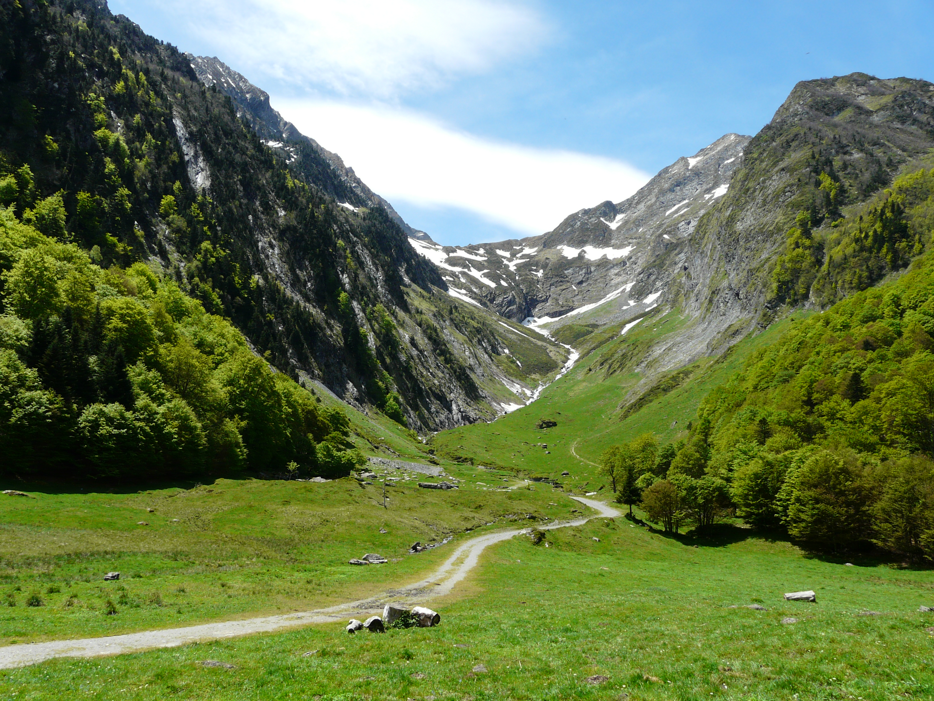 Le cirque du port de Vénasque, Bagnères-de-Luchon (Haute-Garonne, France).